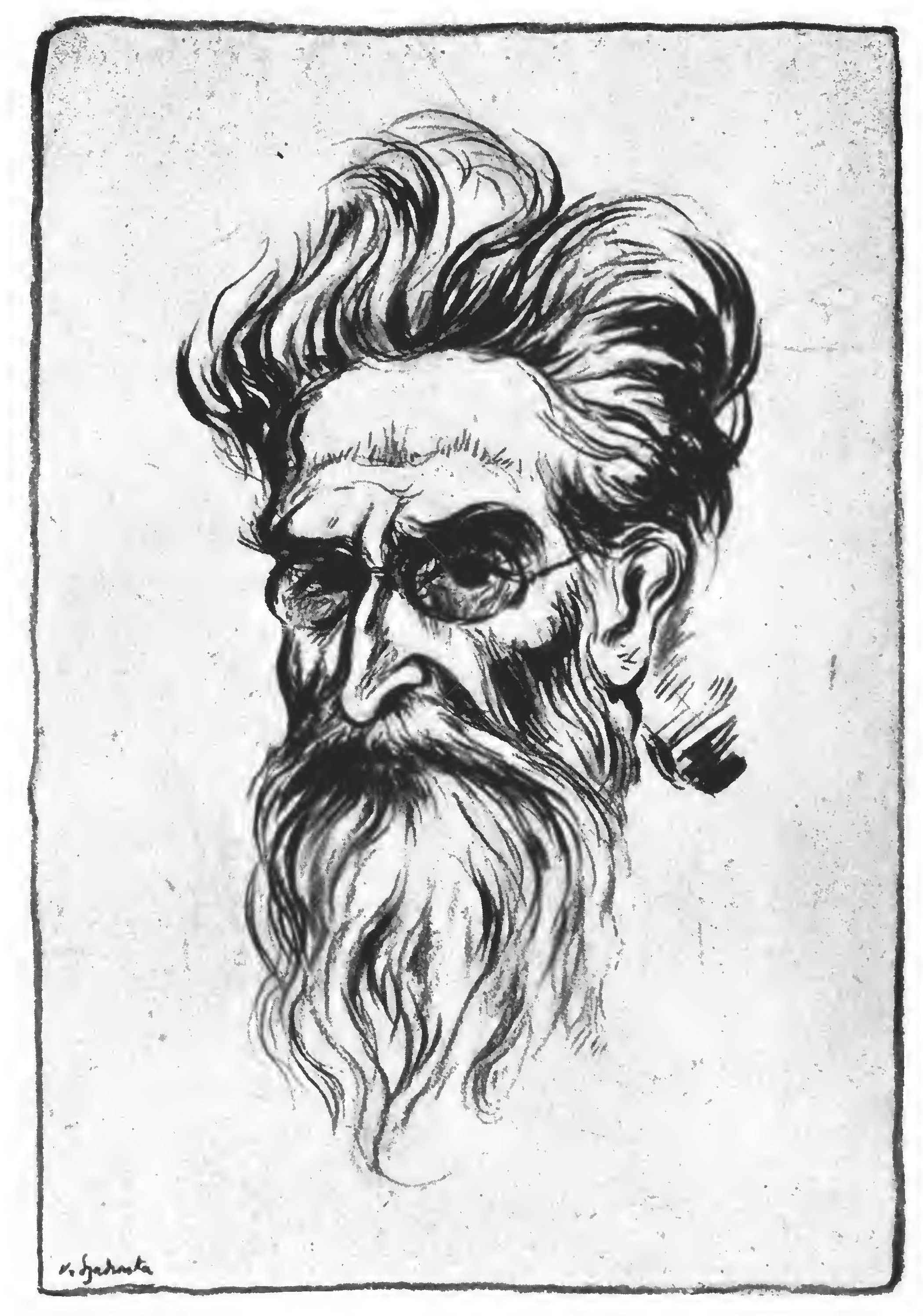 Fritz Mauthner – Zeichnung (1916) von Kasia von Szadurska, gedruckt in: Fritz Mauthner Erinnerungen (1918)